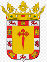 Escudo de la localidad Santiago de la Espada, perteneciente al municipio Santiago-Pontones.